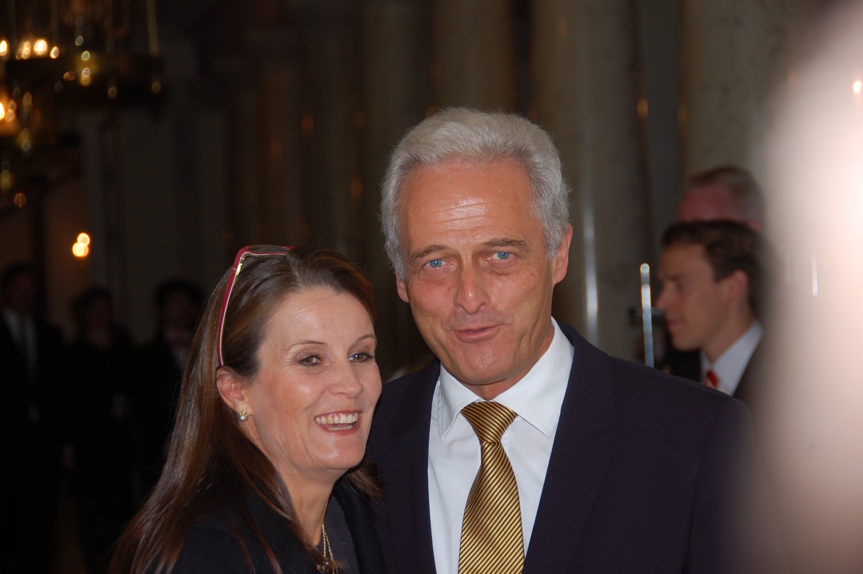 Preisverleihung Quadriga 2010. Bundesverkehrsminister Peter Ramsauer mit Ehefrau Susanne.